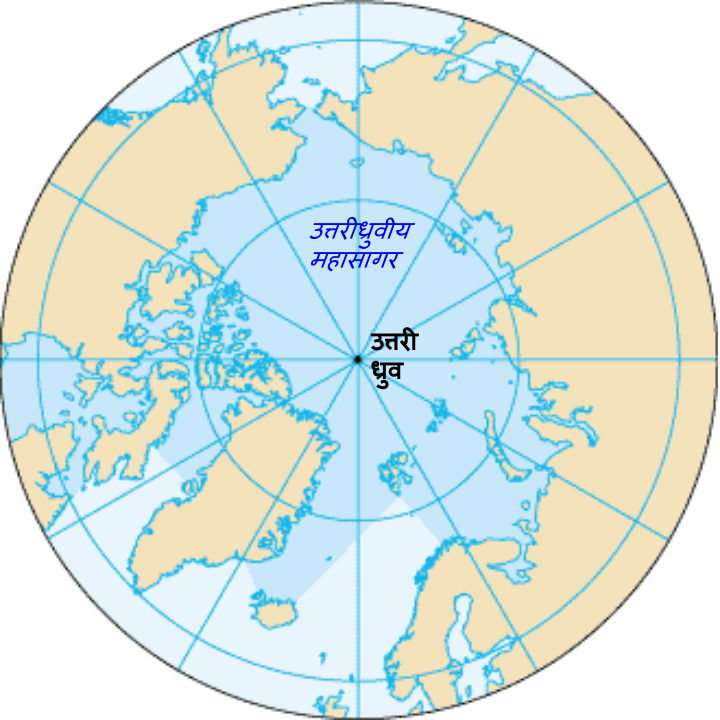 उत्तरध्रुवीय महासागर का रेखाचित्र